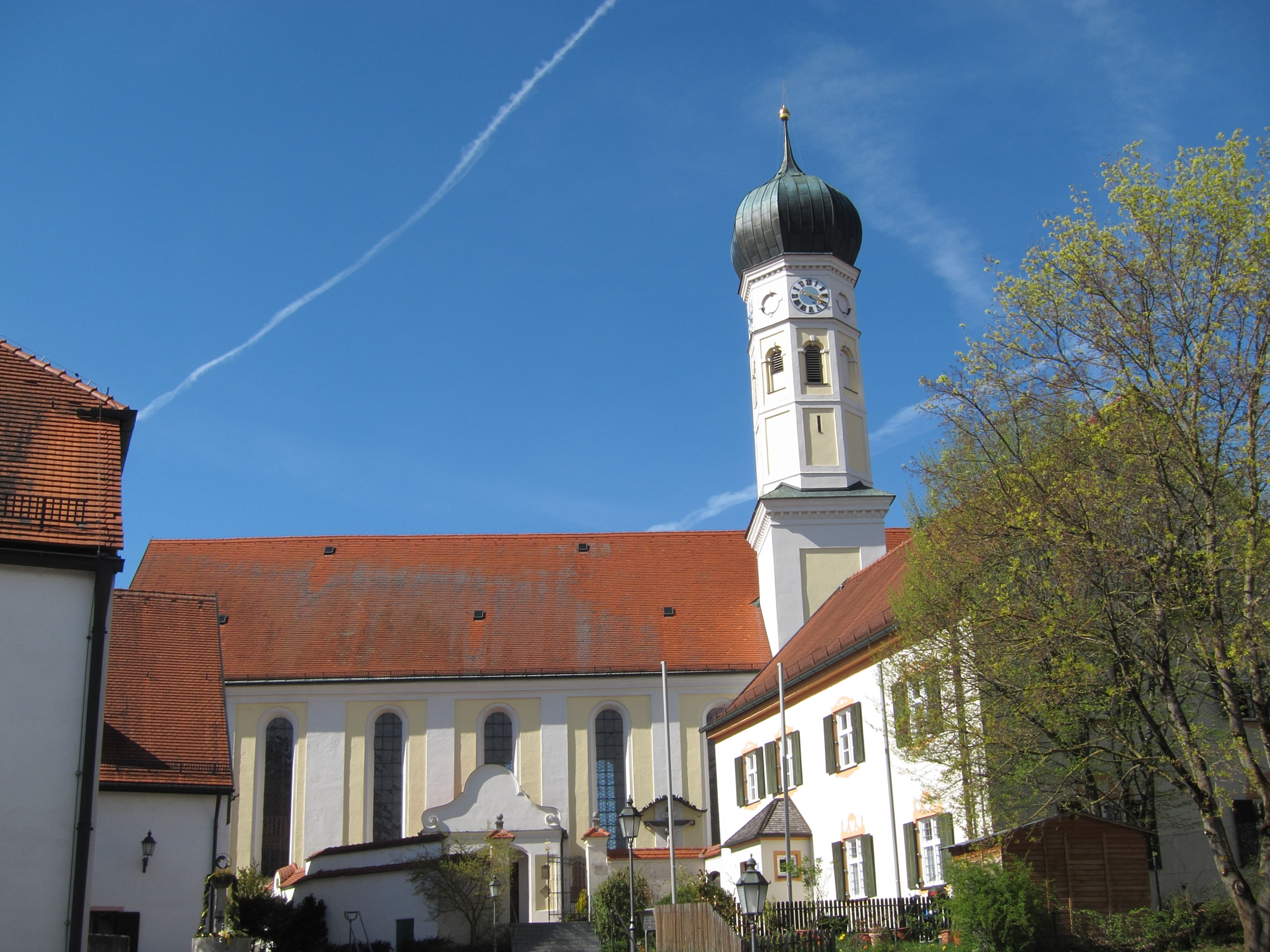 Kirchenplatz 5; katholische Pfarrkirche St Aegidius, barocker Neubau von 1692, im Chor auf gotischen Fundamenten, Verlängerung nach Westen und Unterkirche 1903/04 nach Plänen von Hans Schurr; mit Ausstattung.